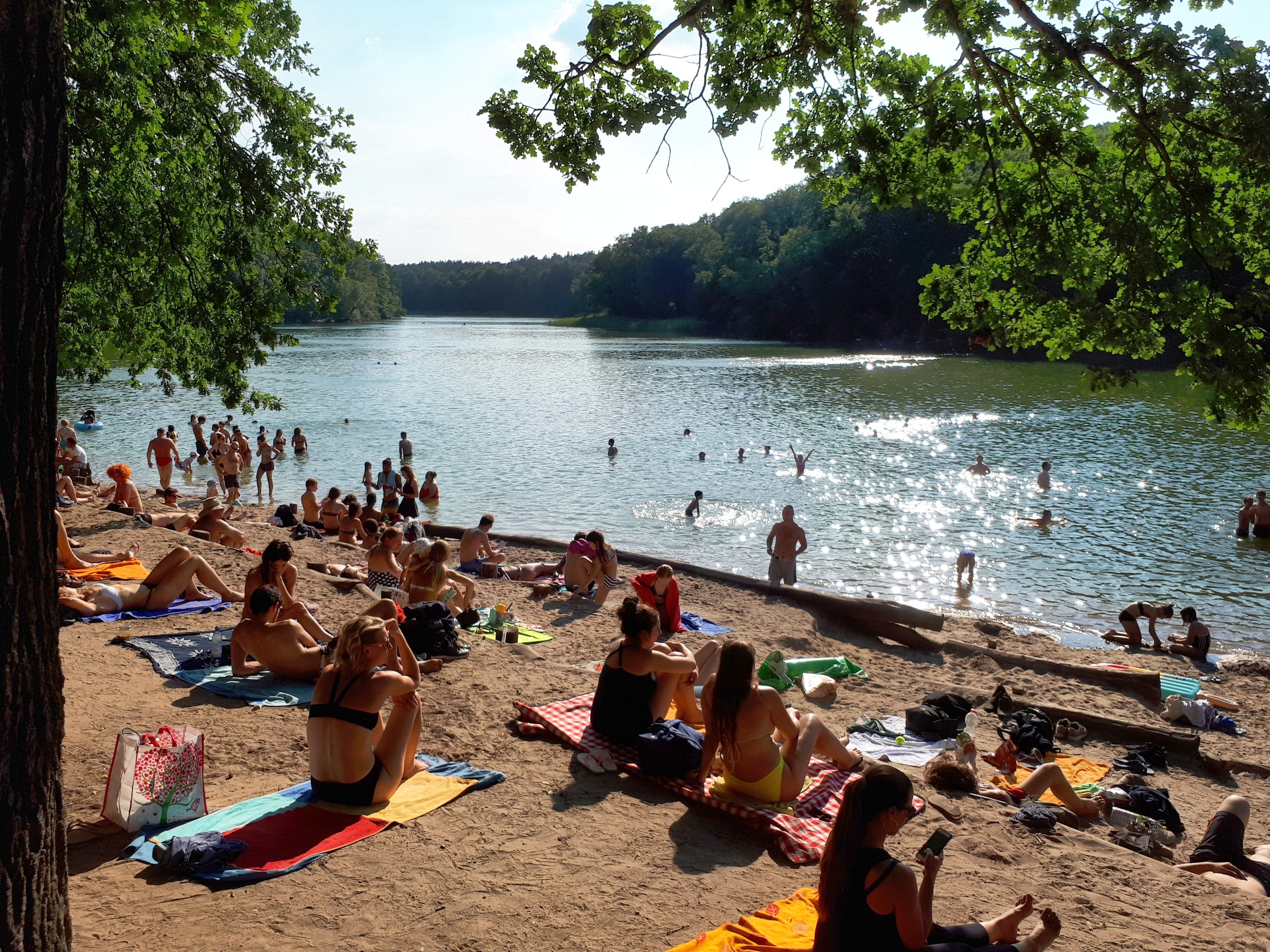 Zehlendorf Krumme Lanke nördliche Badestelle